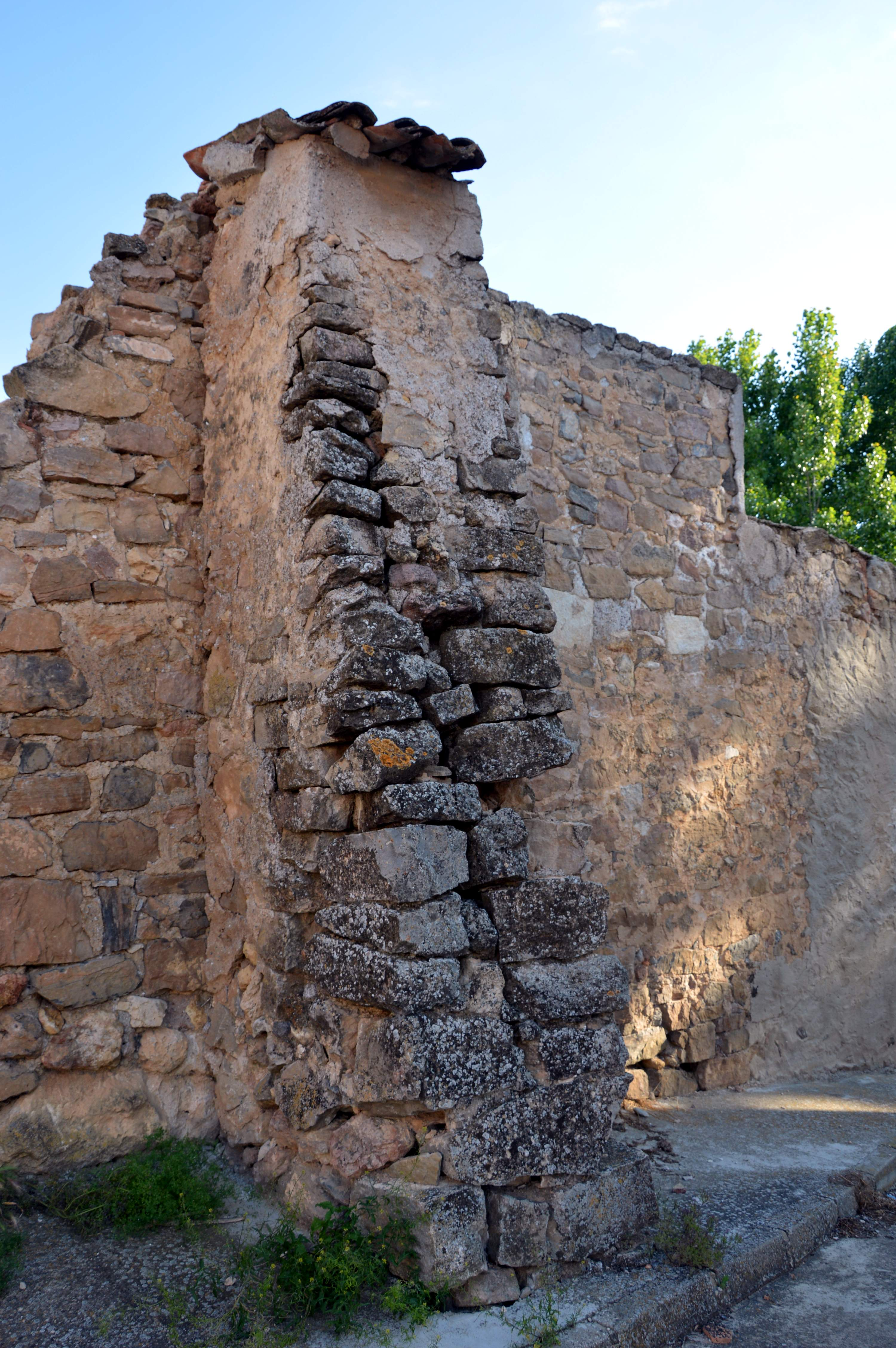 Detalle de muros y contrafuerte de la iglesia conventual, únicos restos materiales del monasterio de las Recoletas Bernardas de Santo Domingo de Moya, Cuenca (2017).